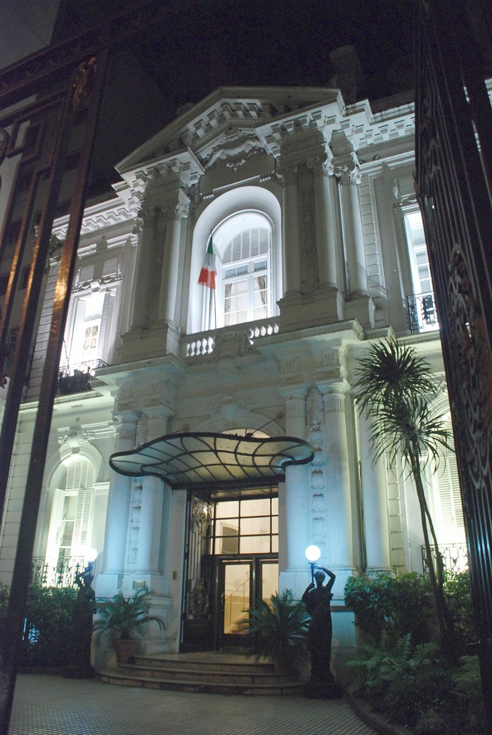 Fachada del Palacio Leloir (también llamado Residencia Leloir). Libertad 1264, Ciudad de Buenos Aires